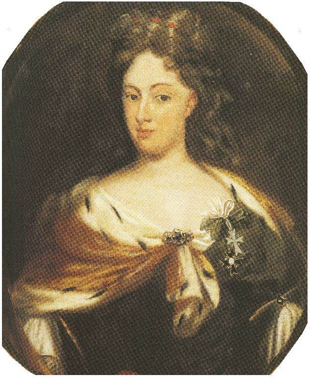 Gemälde von Lancelot Volders (zugeschrieben)